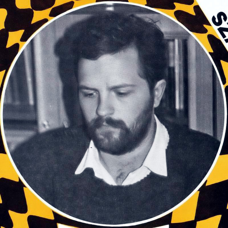 Aleksander Wojtkiewicz (ur. 15 stycznia 1963 w Rydze, zm. 14 lipca 2006 w Baltimore) – polski szachista, reprezentant Stanów Zjednoczonych od 2002 roku.